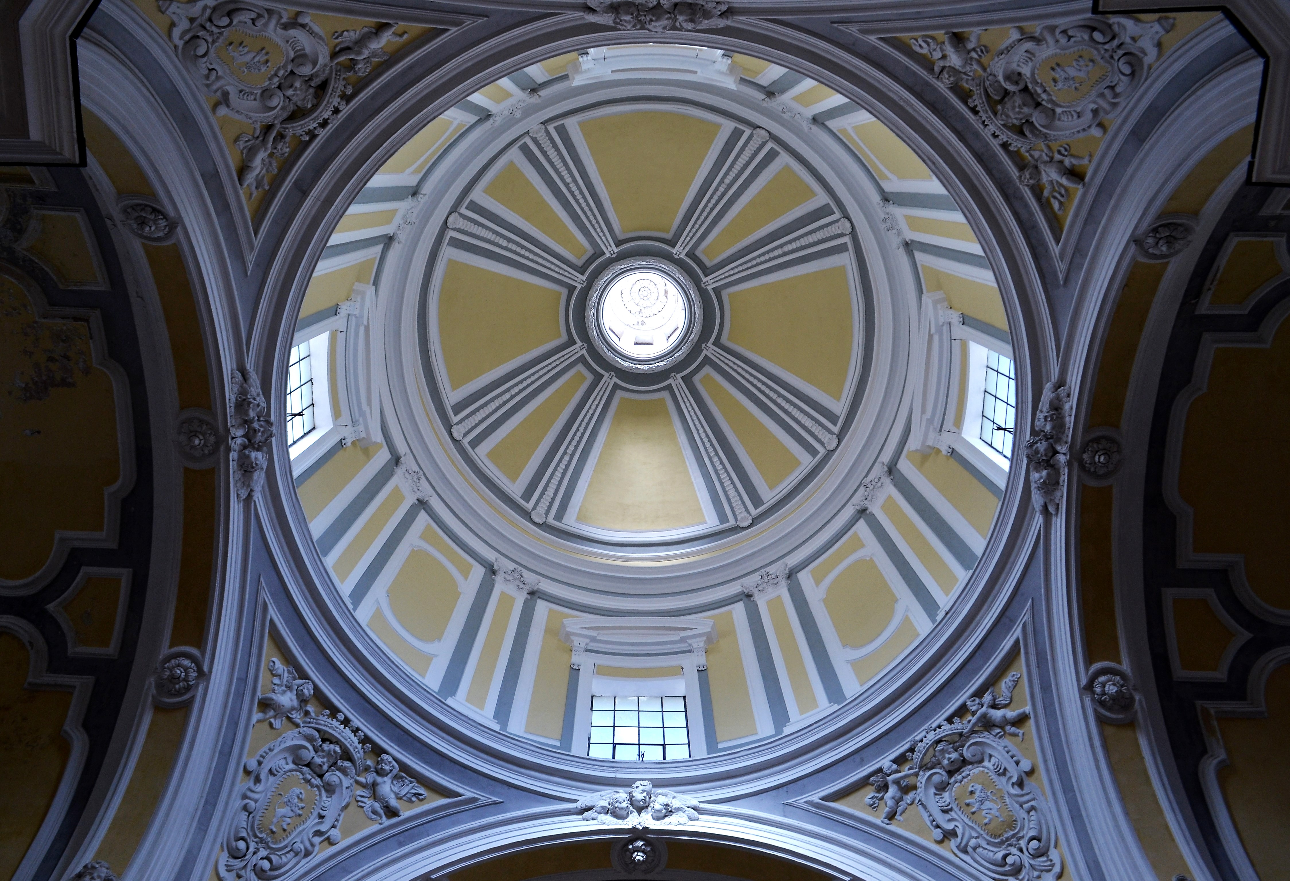 Cupola di San Severo fuori le mura